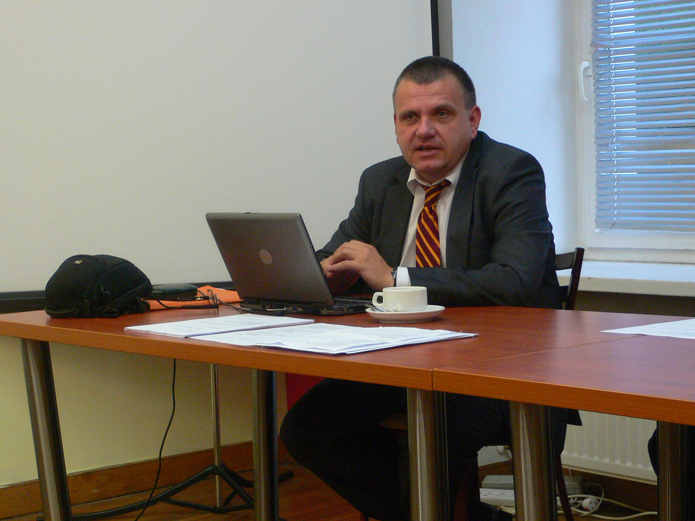 Prof. Damohorský předsedající sekci na konferenci práva životního prostředí